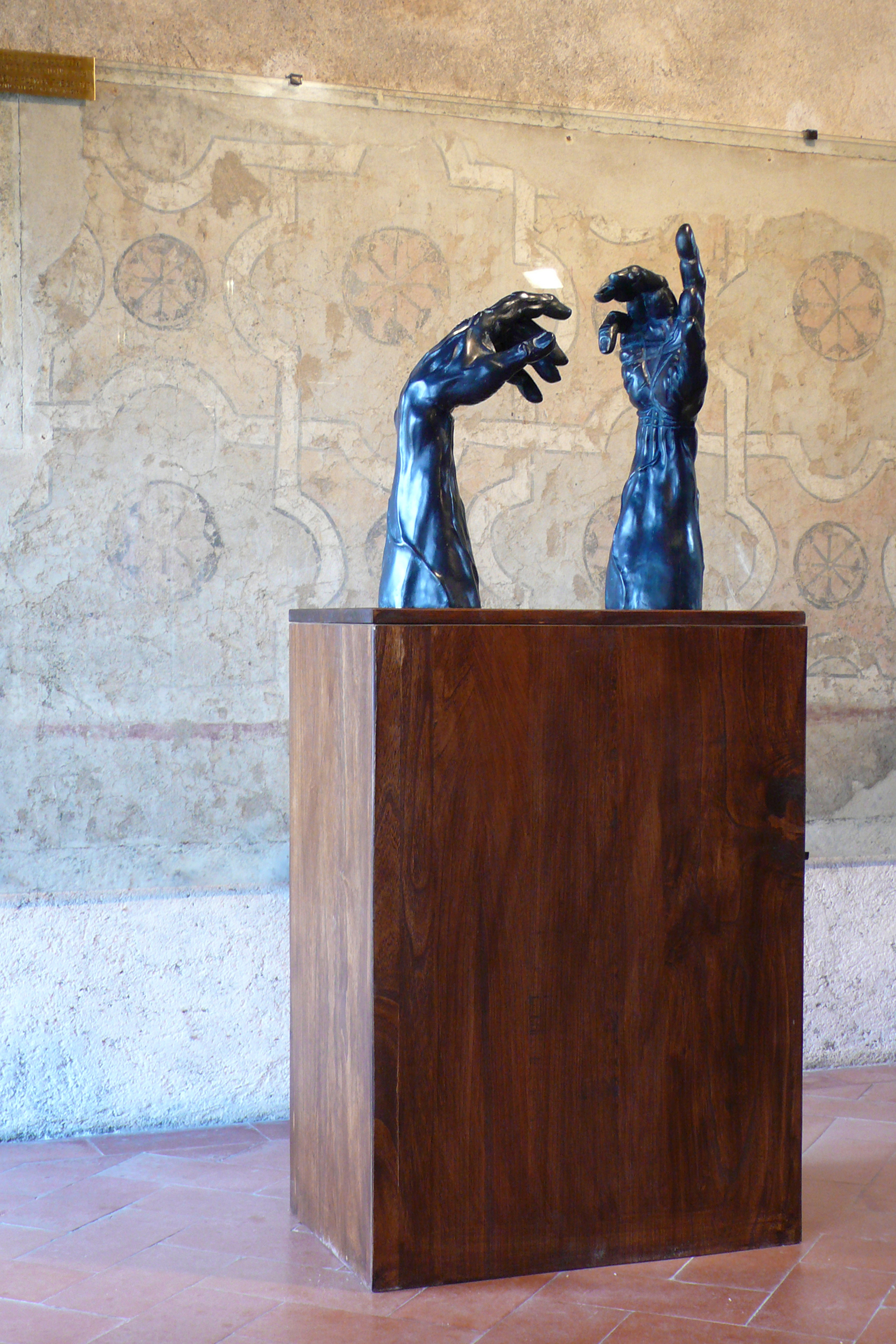 La Creazione im Museo Michelangiolesco in Caprese Michelangelo